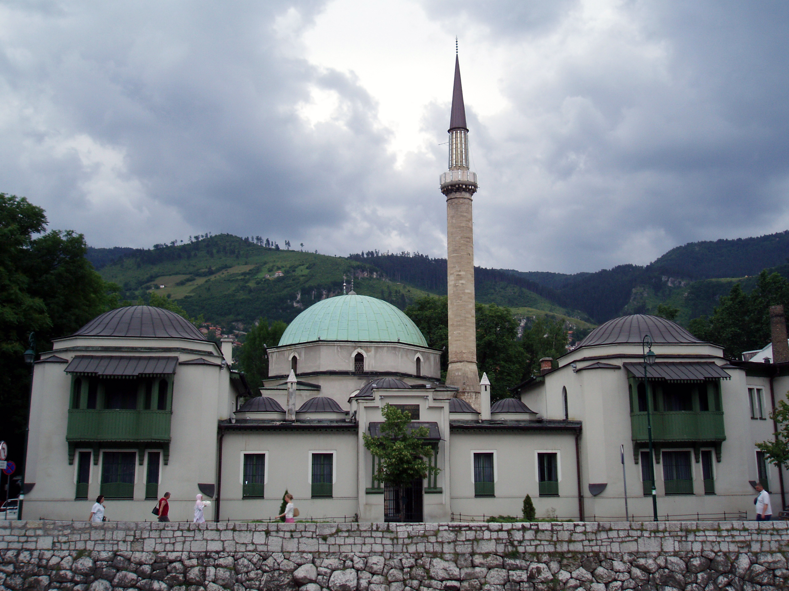 Tsar's Mosque.